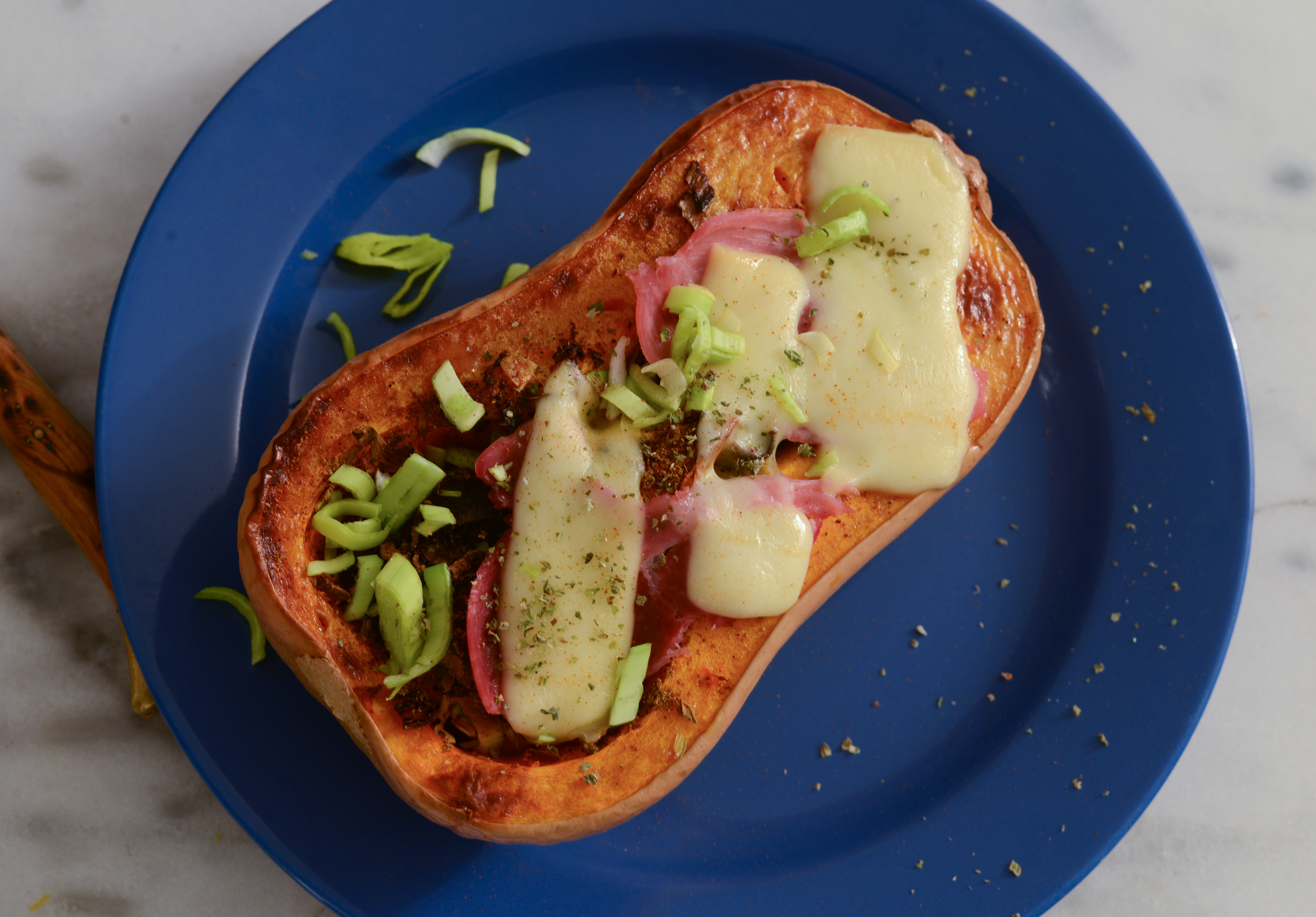 Courge butternut au four. Ingrédients: Poireaux, jambon de Bayonne, raclette, sel de Guerlande, sirop d'érable, épices (diverses et variées, dont poivre et pimentón), origan, un fil d'huile d'olive.